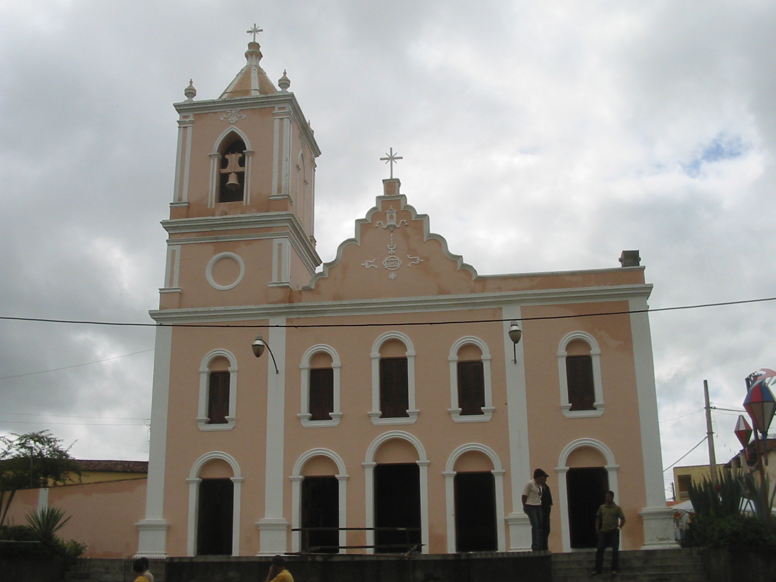 Agrestina (Pernambuco), Brasil. Igreja Matriz, sua construção inicial remonta às últimas décadas do século XVIII, tendo sido reformada várias vezes (1816, 1846, 1879, 1920 e 1993). Agrestina (Pernambuco), Brazil. Church.